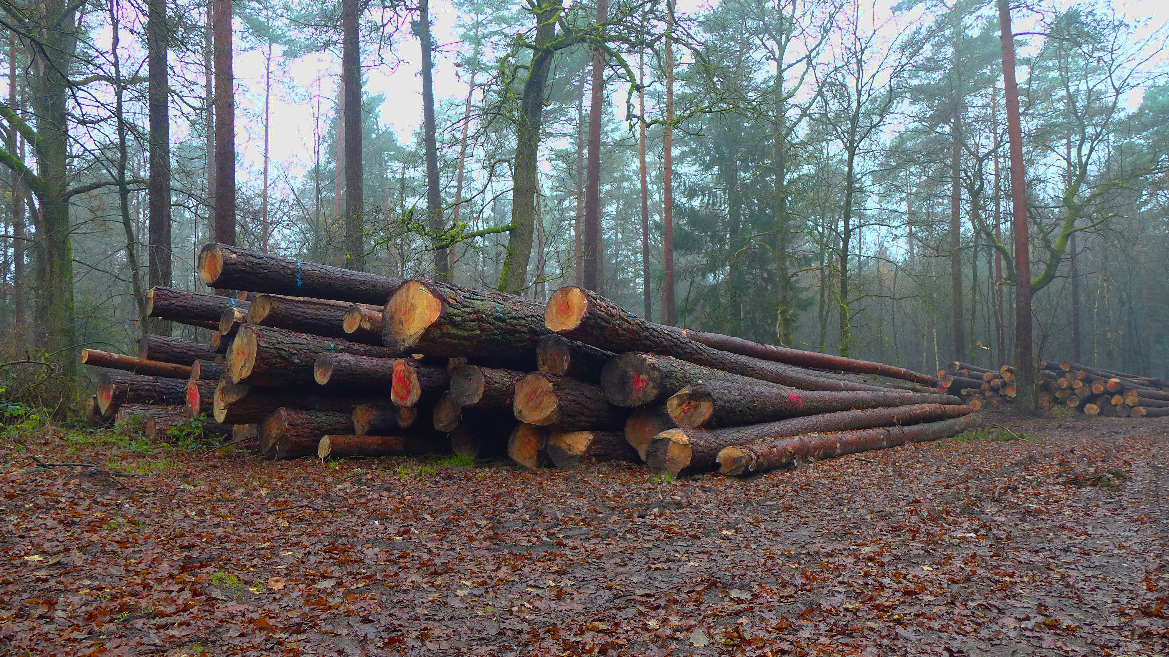 Gefällte Kiefern bei Stübeckshorn in der Lüneburger Heide, Niedersachsen. Aufnahmedatum Dezember 2013.